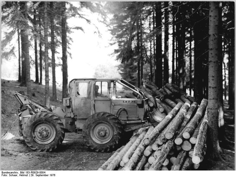 Ilmenau, Schlepper beim Poltern ADN-ZB Schaar 29.9.76 Bez. Suhl: Wahlen. Moderne Technik wie dieser Knickschlepper LKT 75 aus der CSSR hilft den Forstarbeitern bei ihrer teilweise schweren Arbeit. Die Werktätigen des Staatlichen Forstwirtschaftsbetriebes Ilmenau haben einen großen Anteil an den guten Ergebnissen, die die Forstarbeiter des Bezirks Suhl erreichten. Noch vor den Volkswahlen können sie ein Planplus von mehr als 8000 Festmeter Rohholz abrechnen.